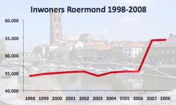 Bevolking van Roermond 1998 t/m 2008